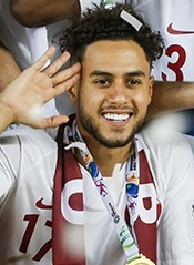 دیدار فینال جام ملت‌های 2019 آسیا بین تیم ملی فوتبال قطر و ژاپن بعدظهر جمعه 12 بهمن در ورزشگاه زاید به قضاوت روشن ایرماتوف ازبکستانی برگزار شد.المعزعلی در دقیقه 12 و عبدالعزیر حاتم 27 و اکرم عفیف در دقیقه 83 با ضربه پنالتی برای قطر گلزنی کردند.برای ژاپن مینامینو 69 موفق به گشودن دروازه قطر شدند.